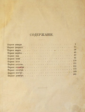 Салтыков-Щедрин, Первое издание сборника Круглый год, 1880 год (содержание) «Круглый год». Сочинение М. Е. Салтыкова-Щедрина. — СПб., тип. А. С. Суворина, 1880 г. Выпущено в свет между 16 и 23 июня 1880 г.